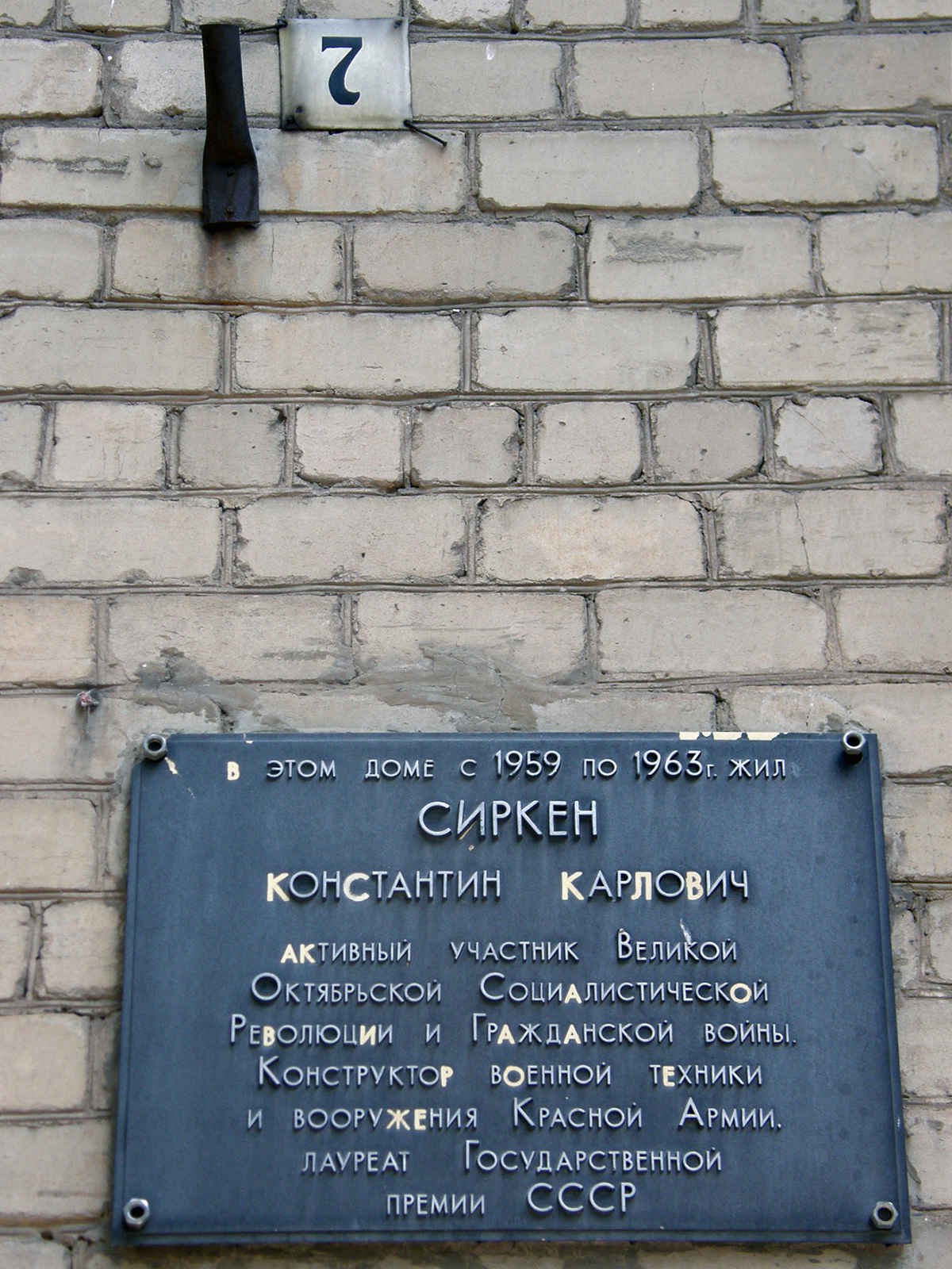 Будинок, у якому жив Сіркєн К. К., революціонер., Краматорськ, вул. Центральна, 7